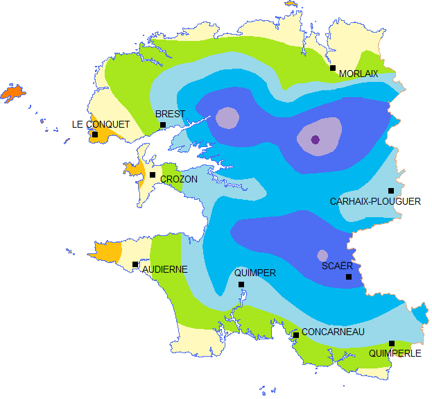 précipitation annuelle dans le Finistère, moyenne sur la période 1996-2007 d'après données météo-france